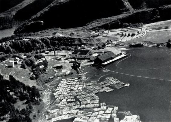 AS Namdalens Træsliperi på Lauvsnes i Flatanger.